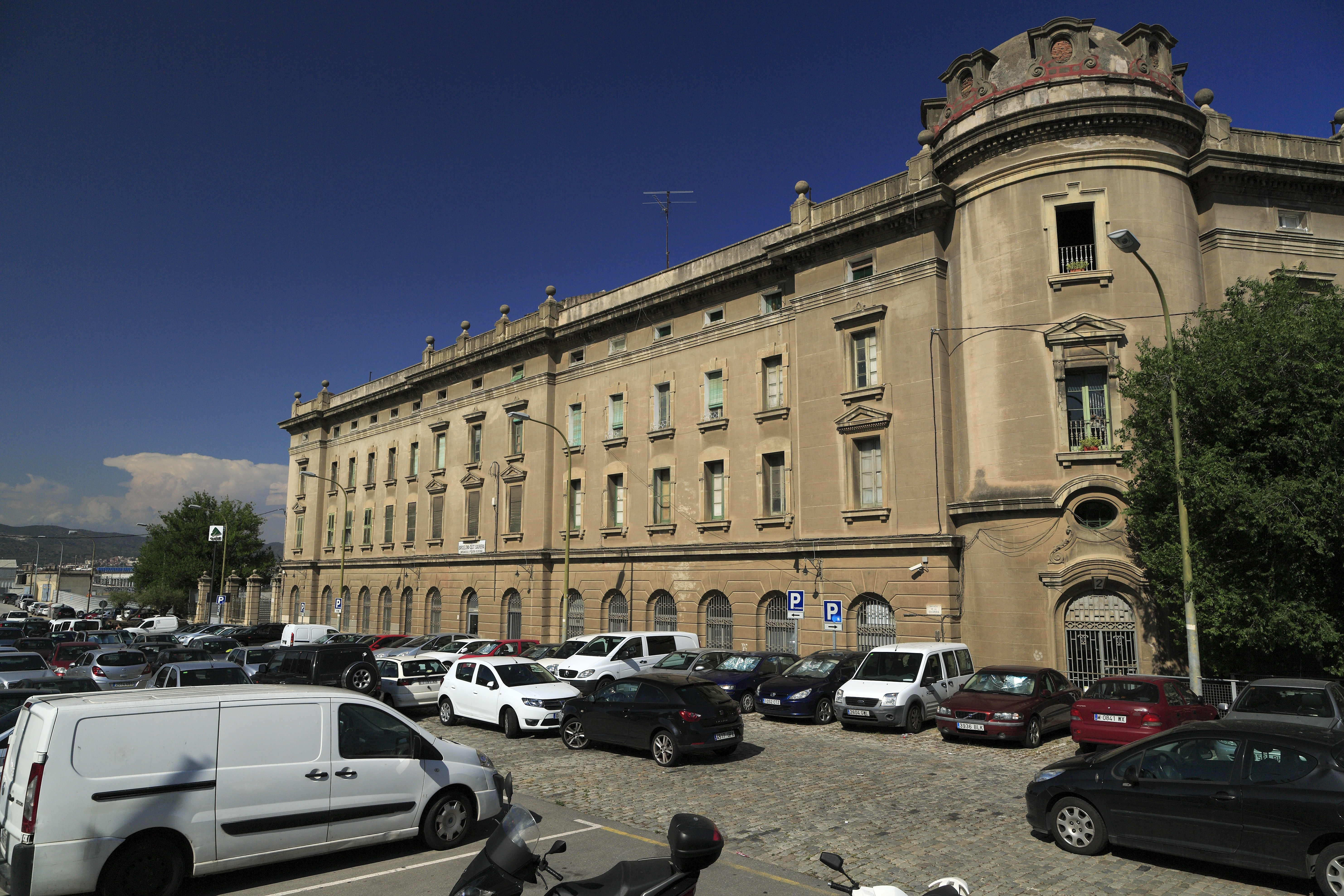 Verwaltungsgebäude des Bahnhofes Barna-Clot (Sagrera), bis zur Einstellung der Verkehre um 1996 Ortsgüterbahnhof.